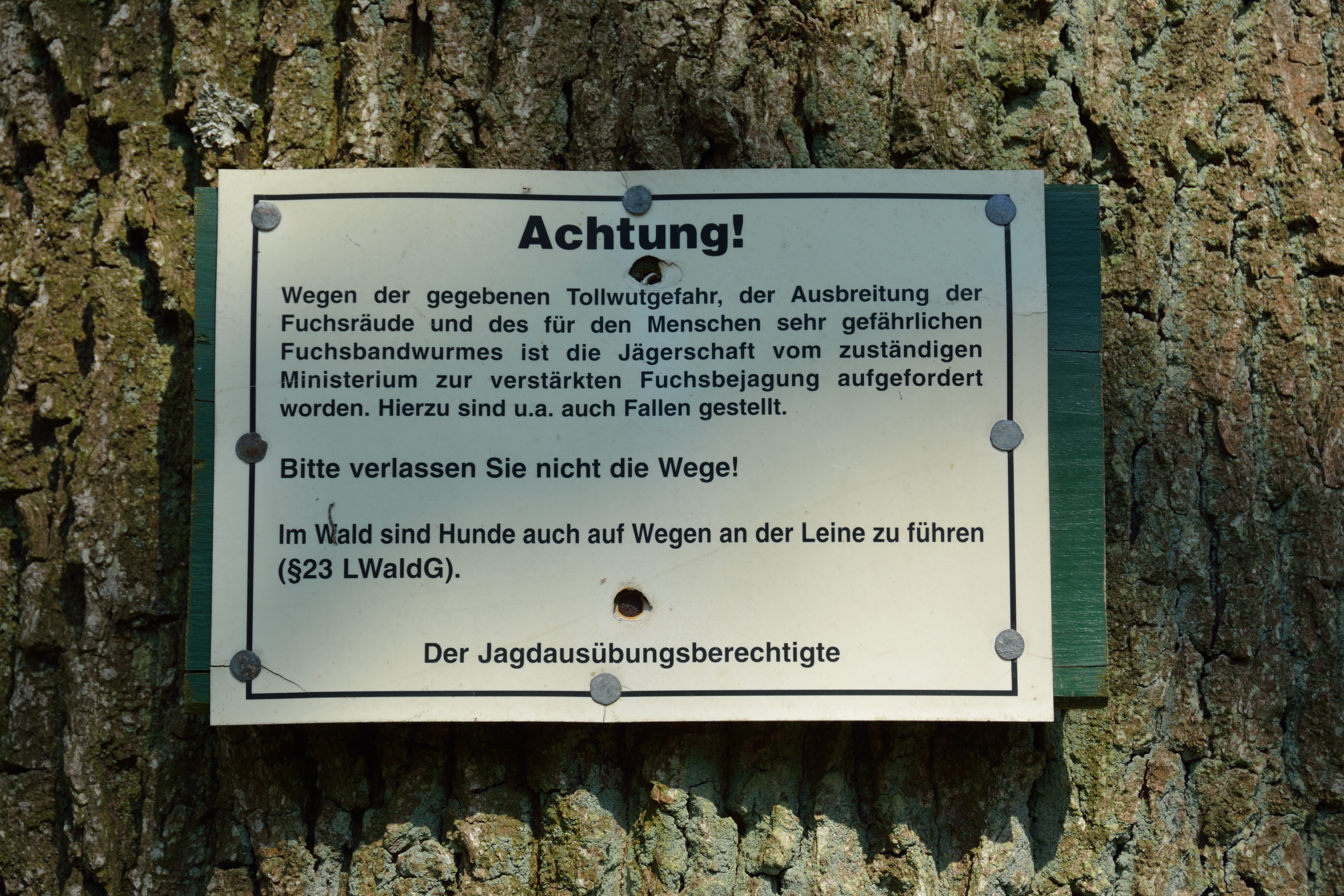 Impressionen an der ehemaligen Bahnstrecke Wrist–Itzehoe in Mühlenbarbek: Ein vermutlich vergessenes Warnschild